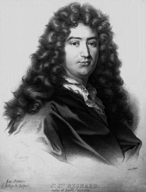 Der französische Dichter Jean-François Regnard (1655-1709)